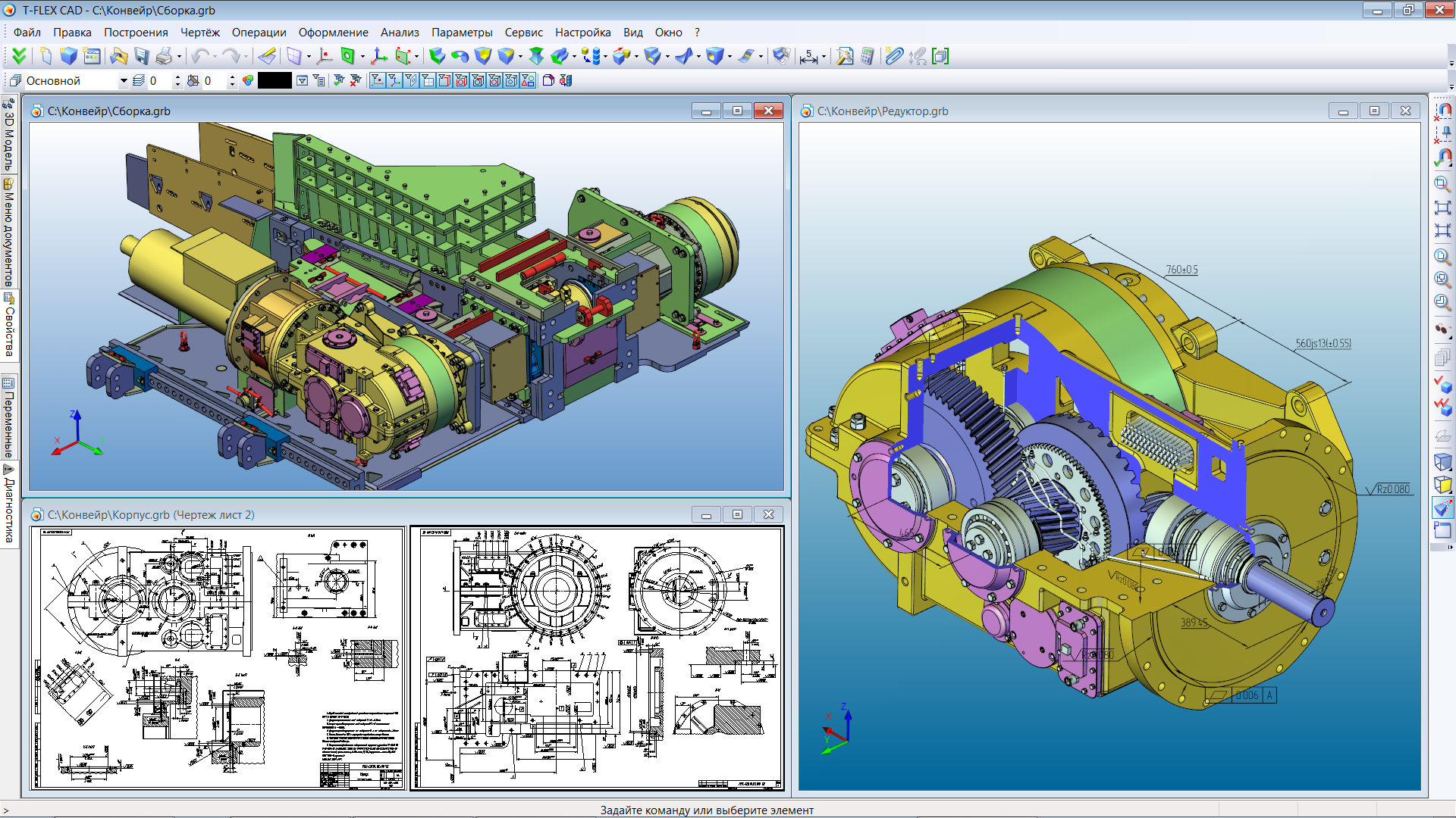 Интерфейс программы T-FLEX CAD 12